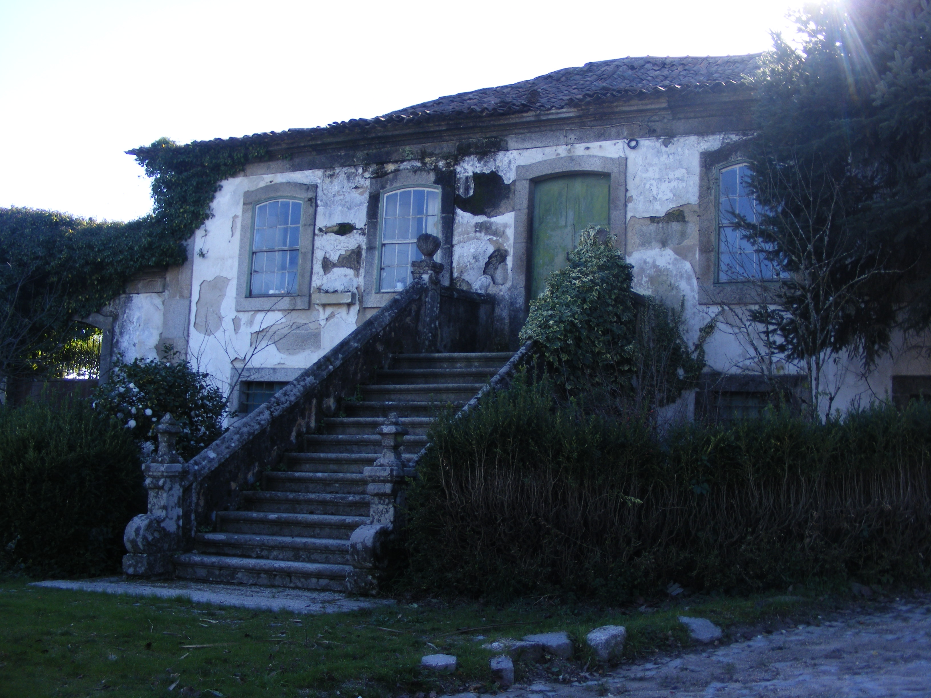 Amarante Fregim Casa de Guimarei